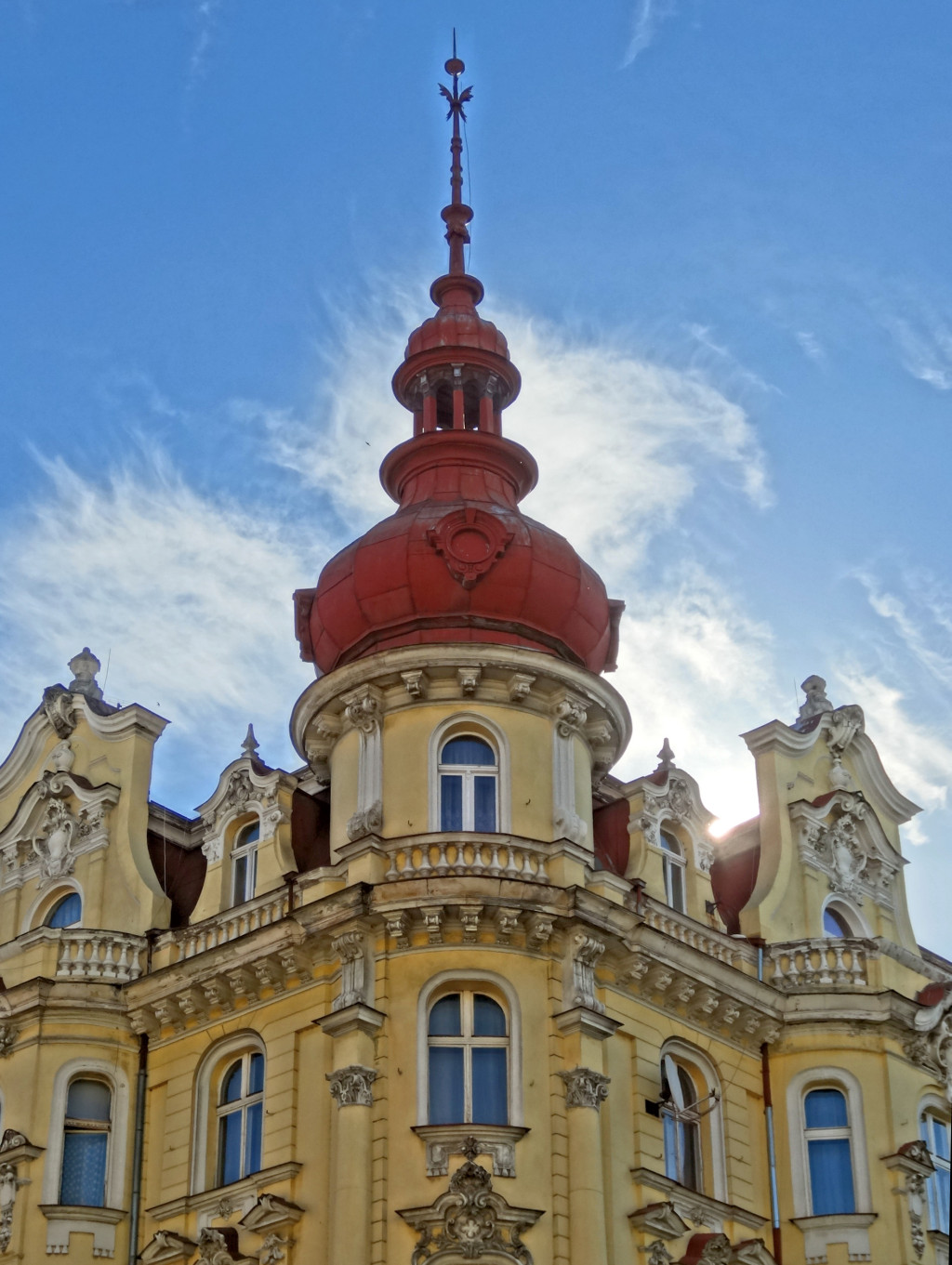 Kamienica Plac Wolności 1 w Bydgoszczy, róg ul. Gdańskiej (1898, aut. Józef Święcicki)